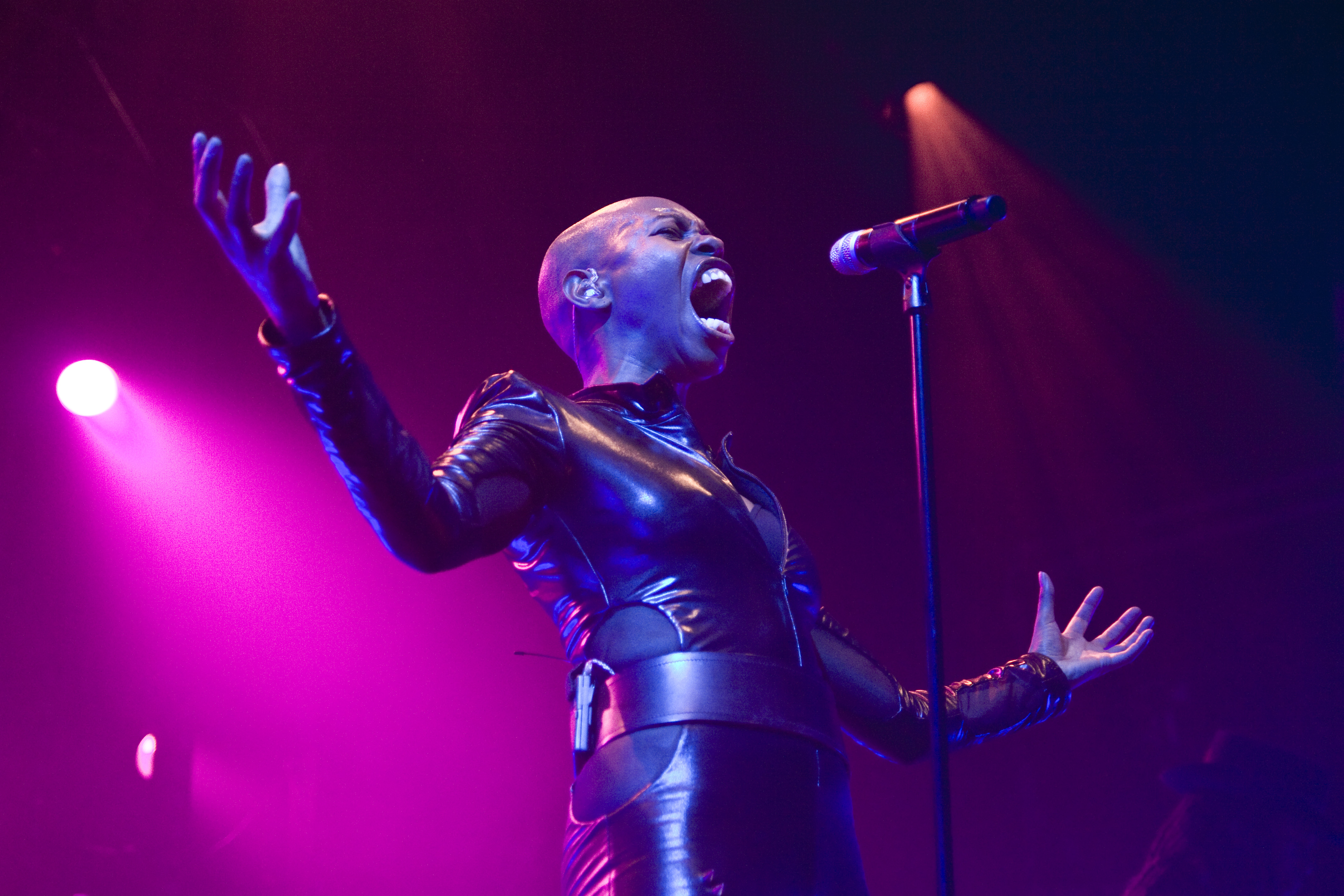 Skunk Anansie - Razzmatazz - Febrero 2011